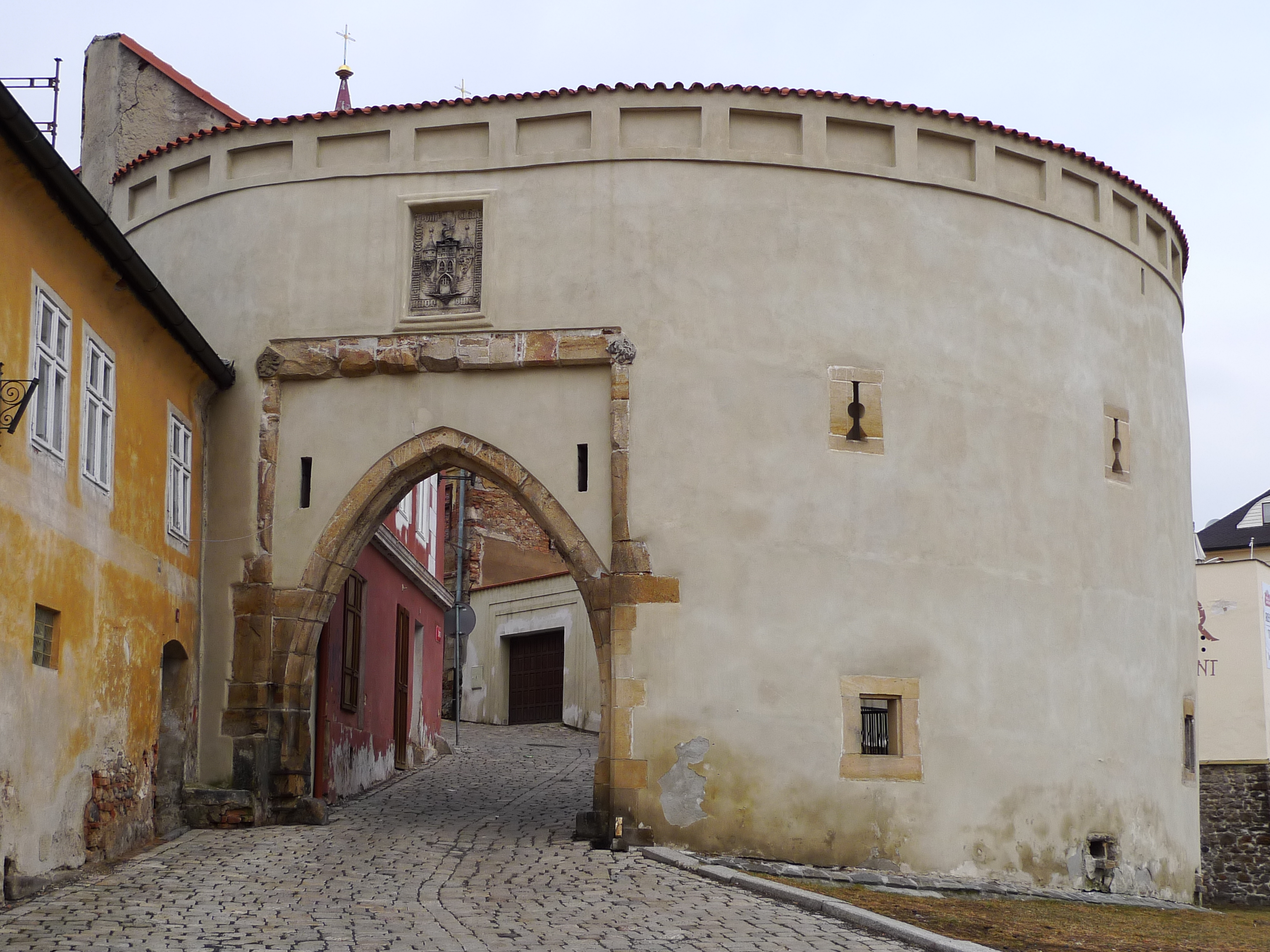 Městské opevnění (Kadaň), Kadaň